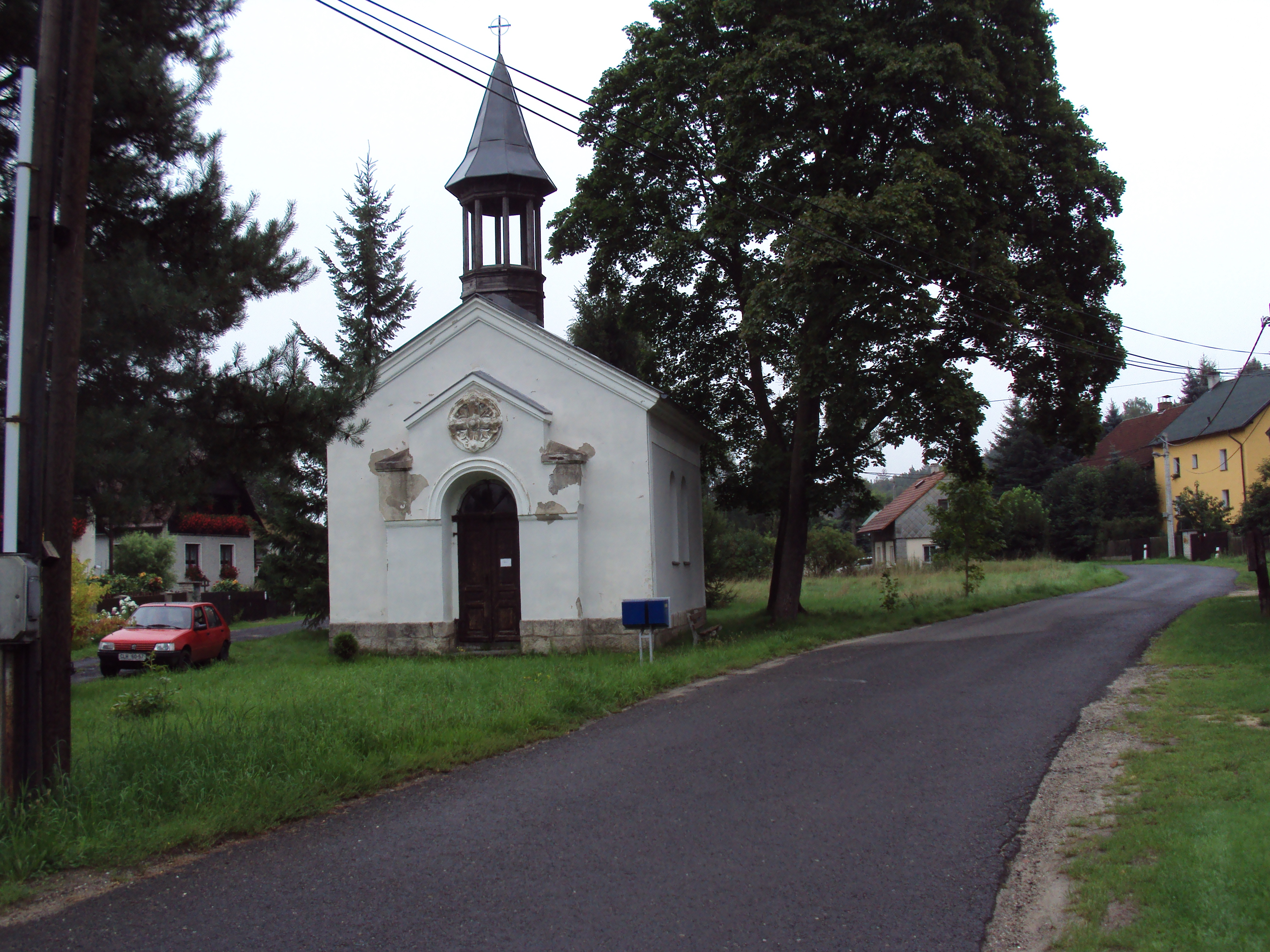 Kaple bez označení uprostřed vsi Okřešice u České L9py